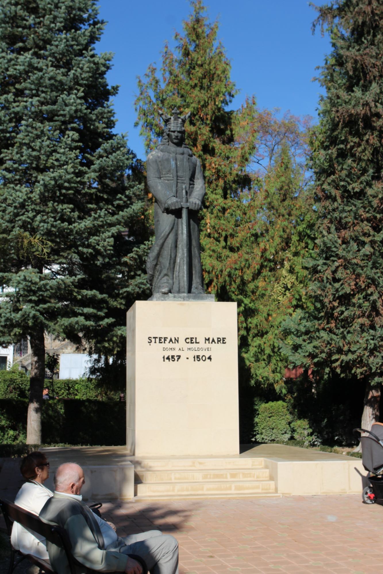 Statuia lui Ștefan cel Mare